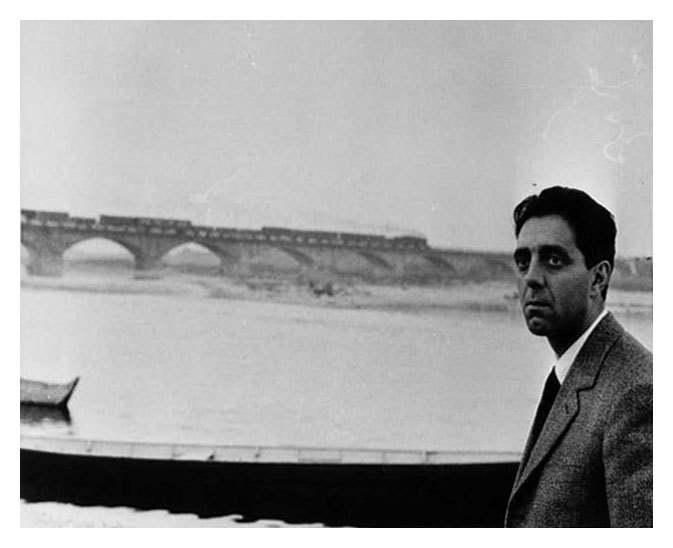 Lucio Mastronardi